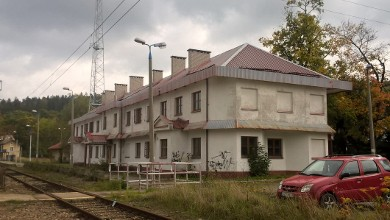 Zwardoń, budynek po byłej siedzibie granicznej placówki kontrolnej Straży Granicznej (SG), od listopada 1995 roku do 24 sierpnia 2005 roku, na stacji kolejowej w Zwardoniu.